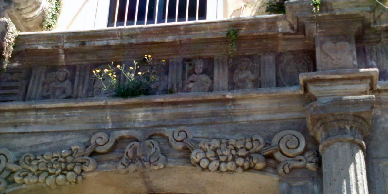 Particolare del portale del convento di Santa Maria degli angeli (XVI-XVII sec.)